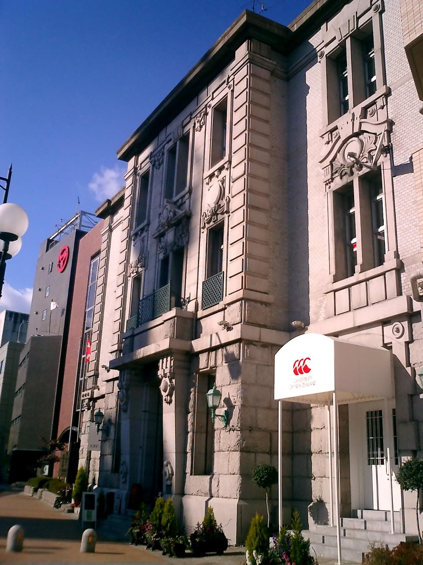 Kaigan Building in Kobe, Japan